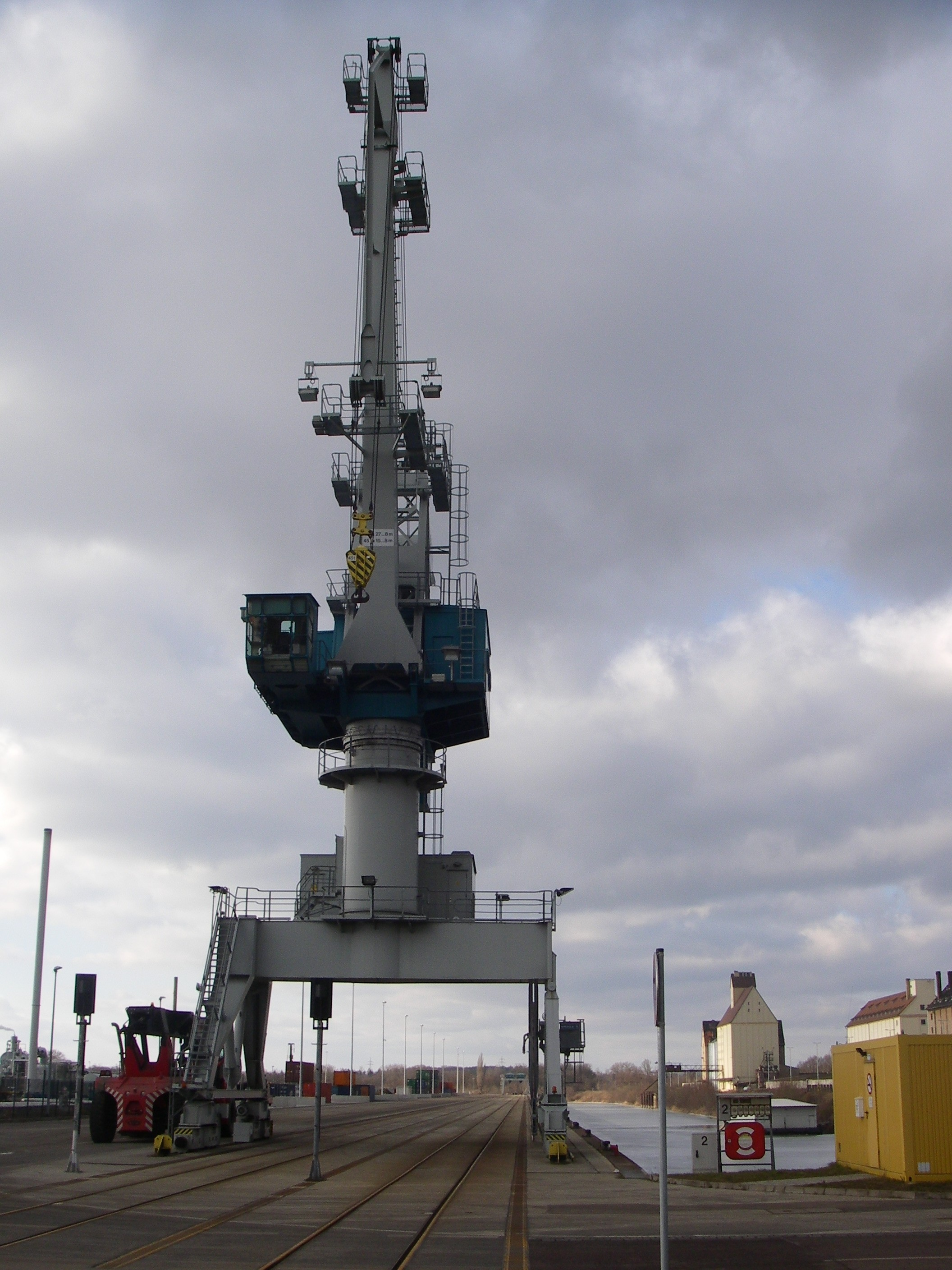 Hafenbecken mit Ladestraße (LkW/Bahn) und Portaldrehkran, Halle (Saale)